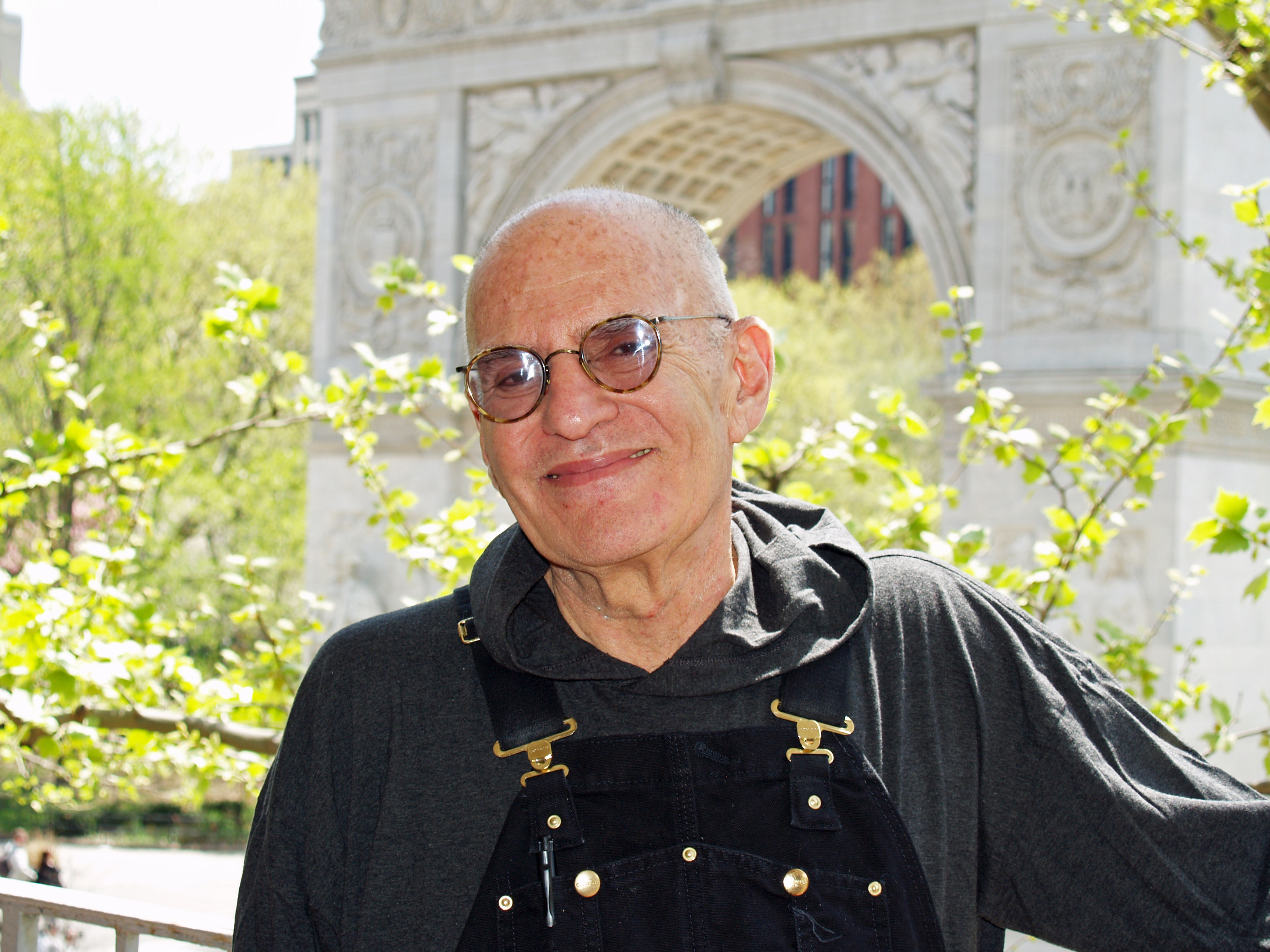 Larry Kramer spring 2 by David Shankbone